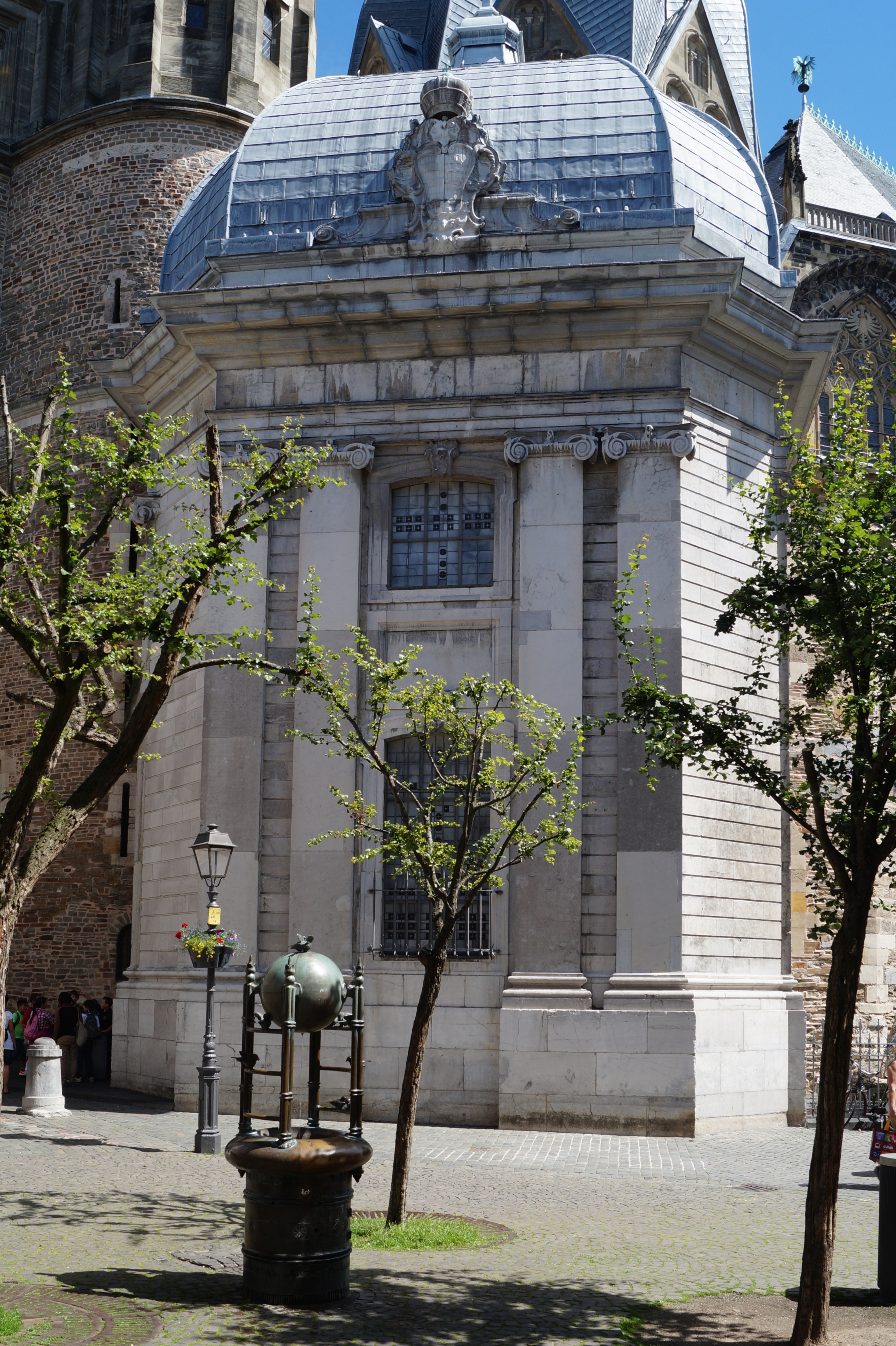 Ungarnkapelle Aachener Dom